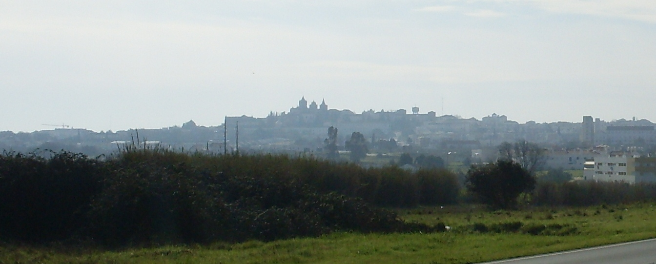 Panorâmica de Évora a partir da N18